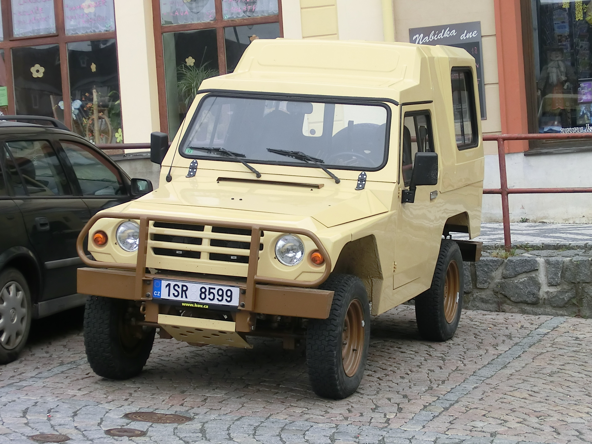 Terénní automobil Avia A11 (licence Auverland A3) zavítala do Jilemnice u příležitosti akce Tatra v Českém ráji 2014, soutěže se však neúčastnila.